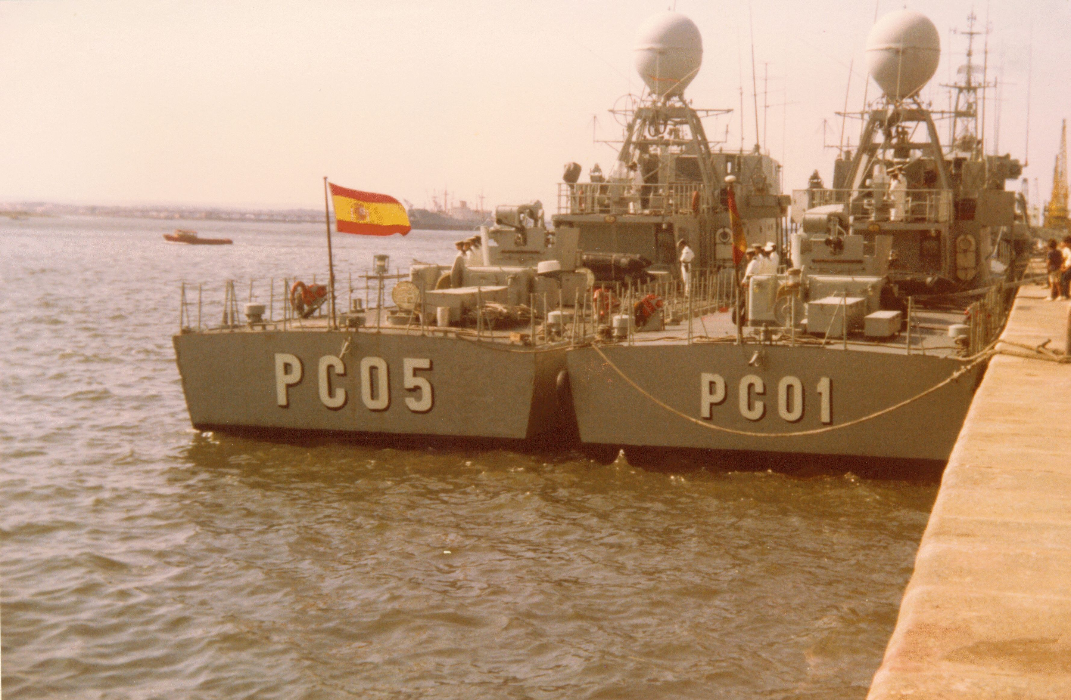 Patrulleros de costa de la Armada española, Bonifaz (PC-05) y Lazaga (PC-01) en el puerto de Huelva, el 3 de Agosto de 1983.